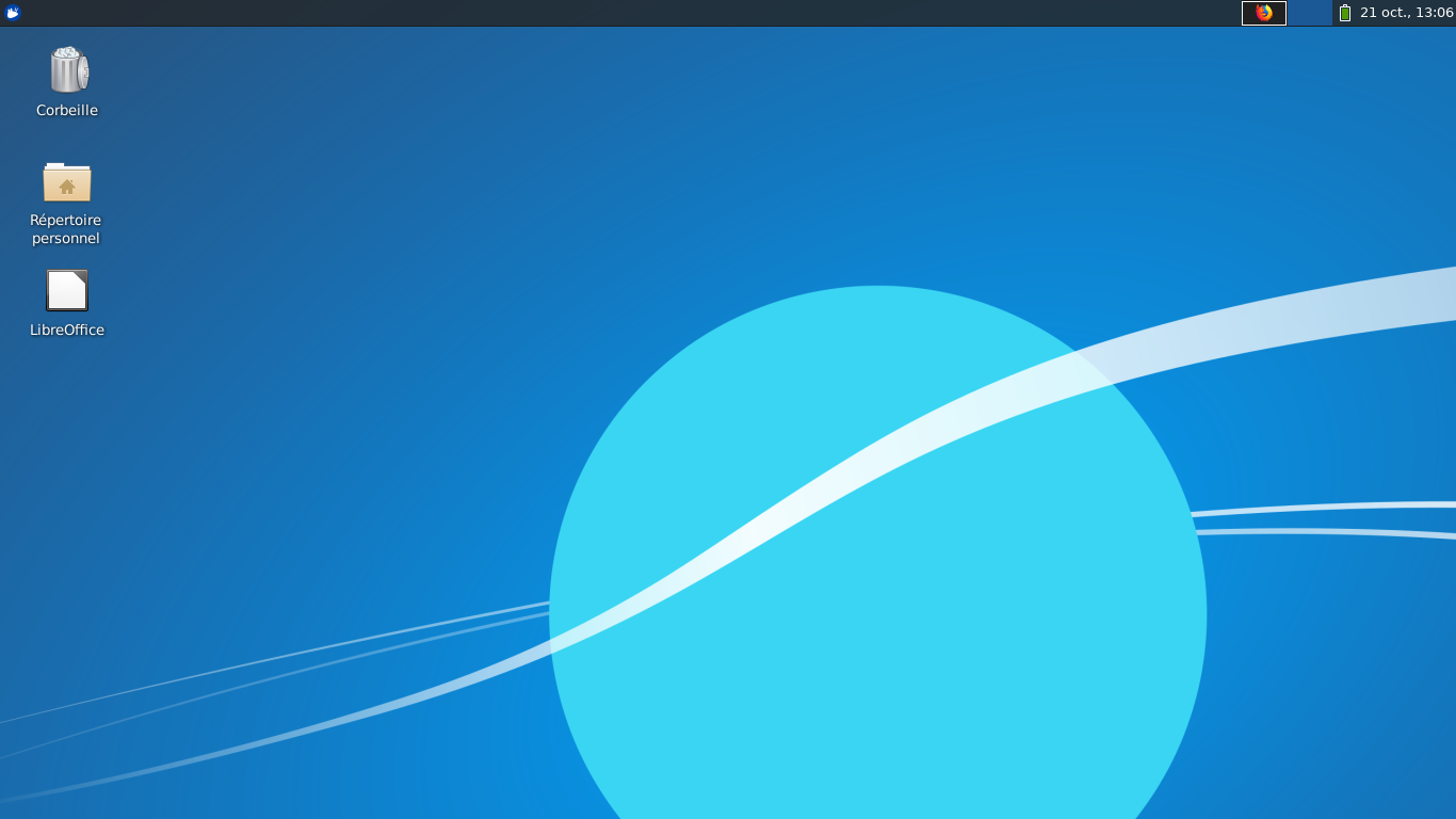 Capture d'écran du bureau Xubuntu 19.10